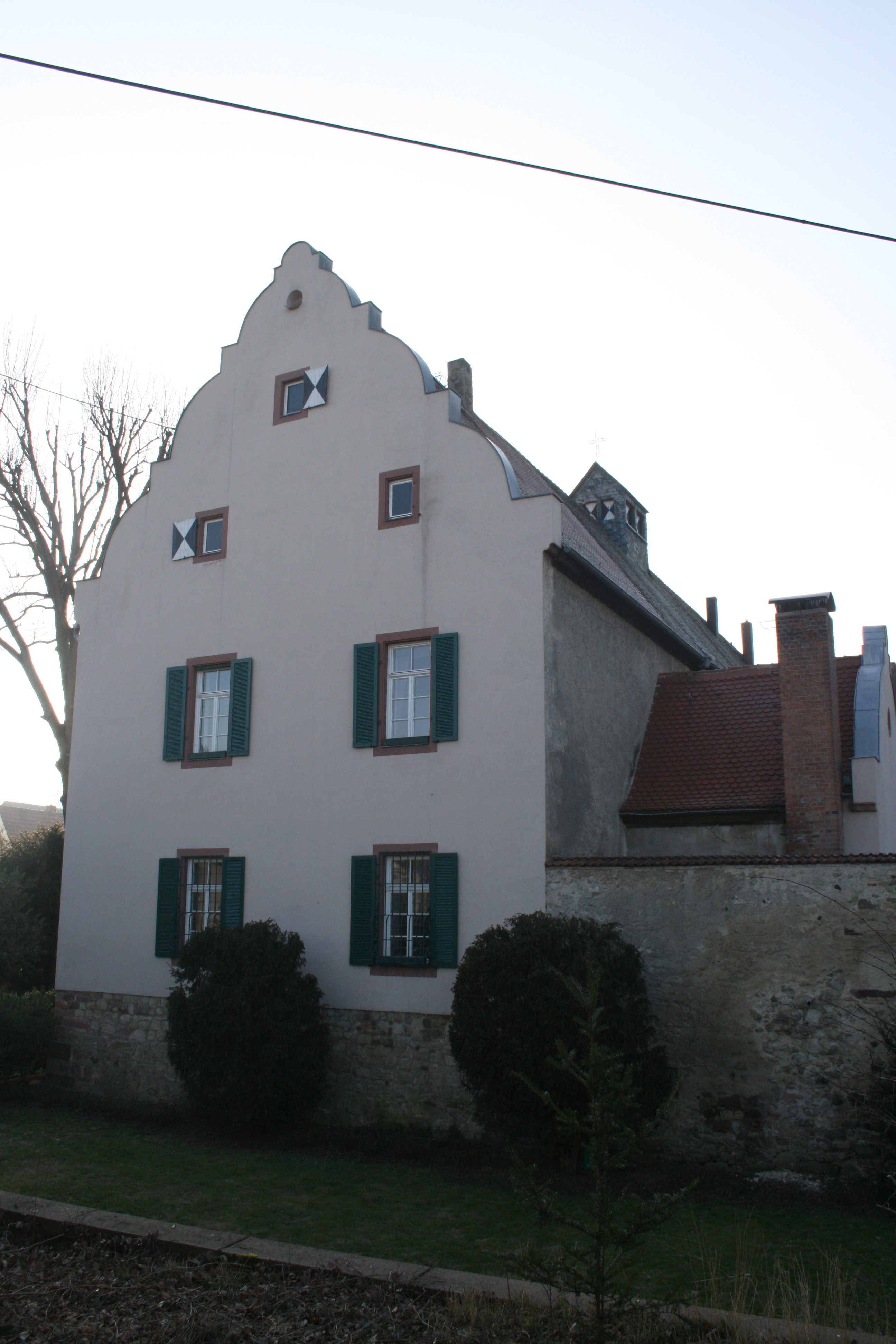 Deutschordensschloss in Kloppenheim, Stadt Karben, Wetteraukreis in Hessen. Ansicht des Hauptgebäudes von Osten.